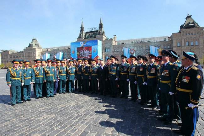 По окончании военного парада в ознаменование 68-й годовщины Победы в Великой Отечественной войне.